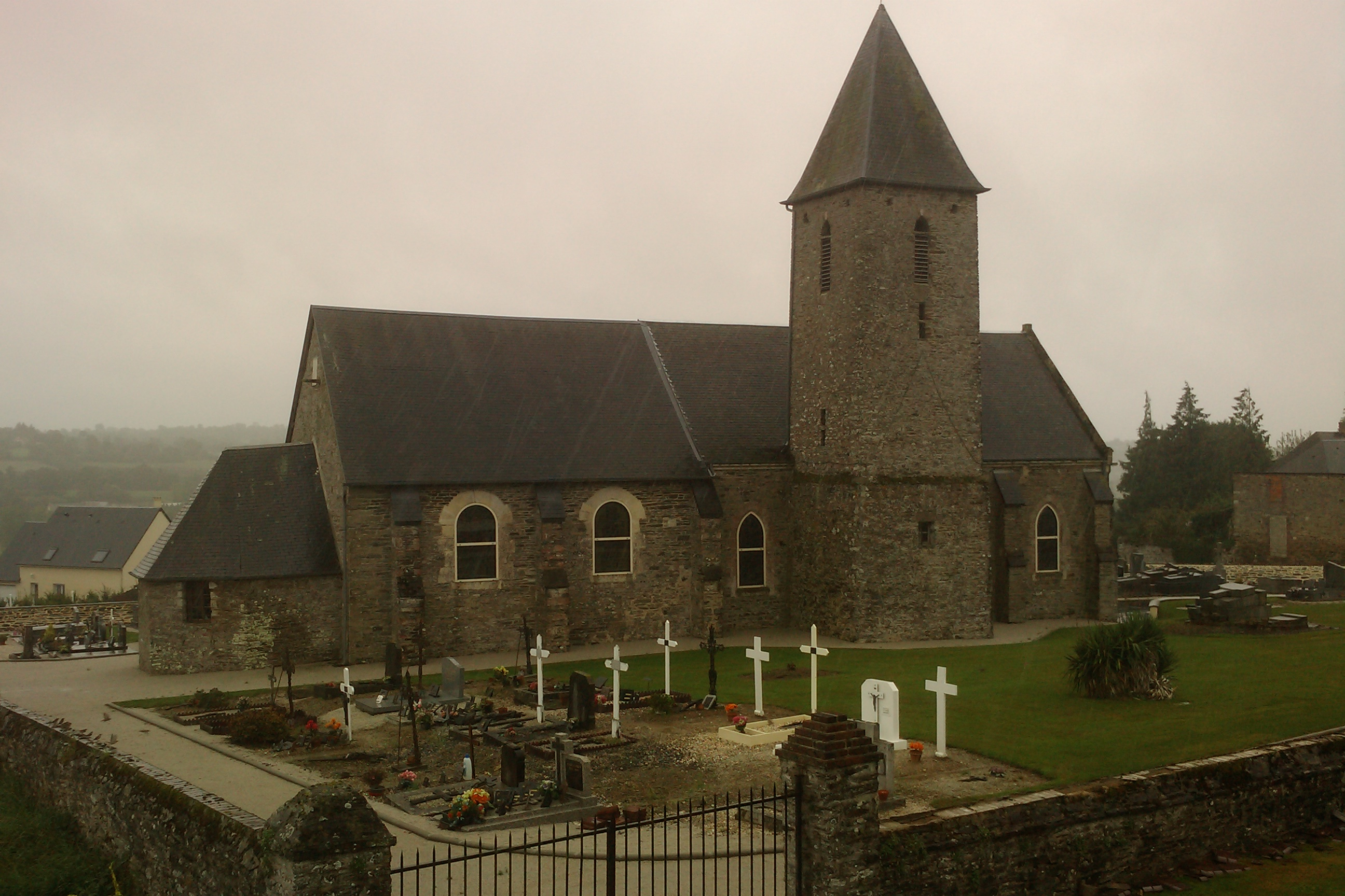 église de Précorbin